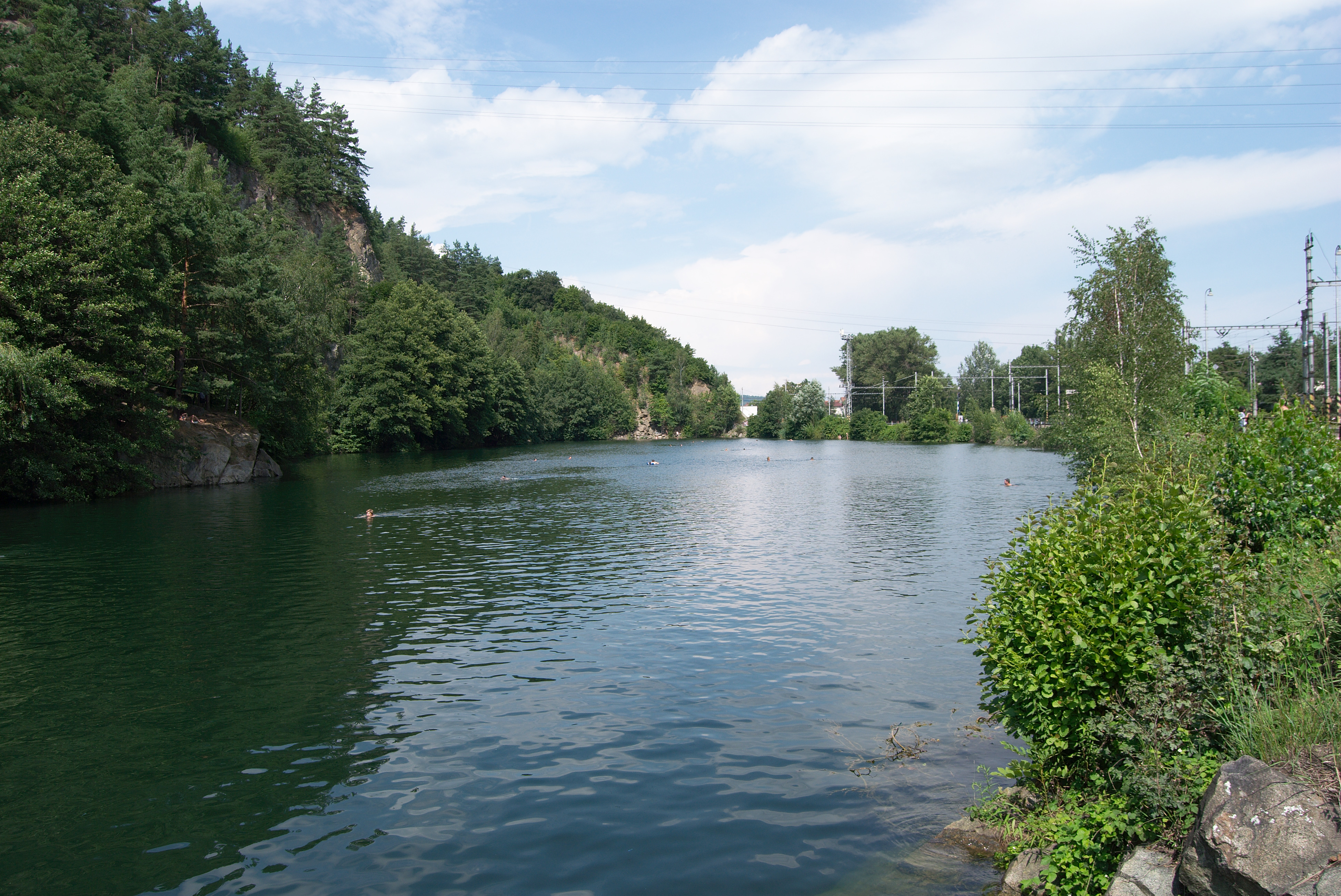 Zatopený lom v Blansku vyfotografovaný od jihovýchodu